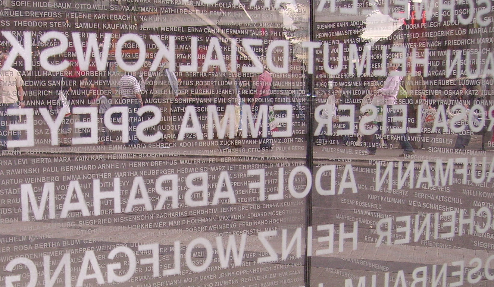 holocaust monument by Jochen Kitzbihler in Mannheim, Germany